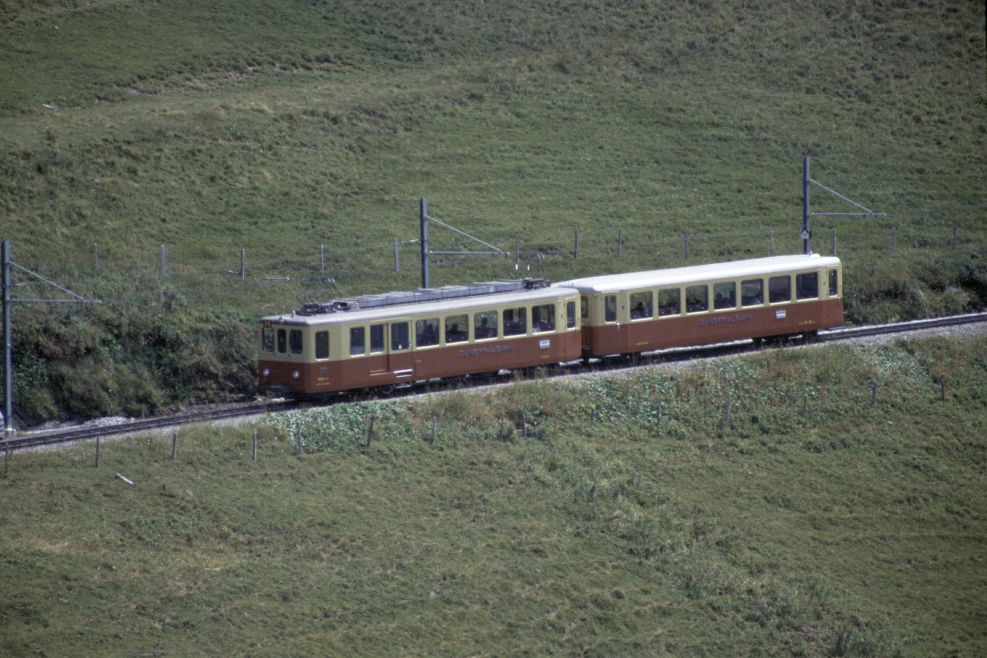 Jungfraubahn